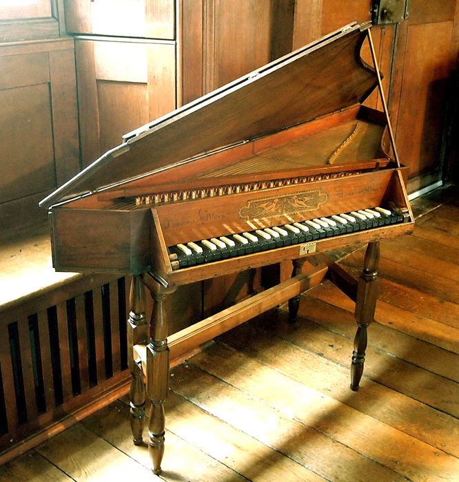 اسپینت